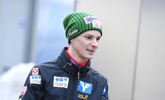 Konkurs drużynowy mężczyzn na skoczni K-120